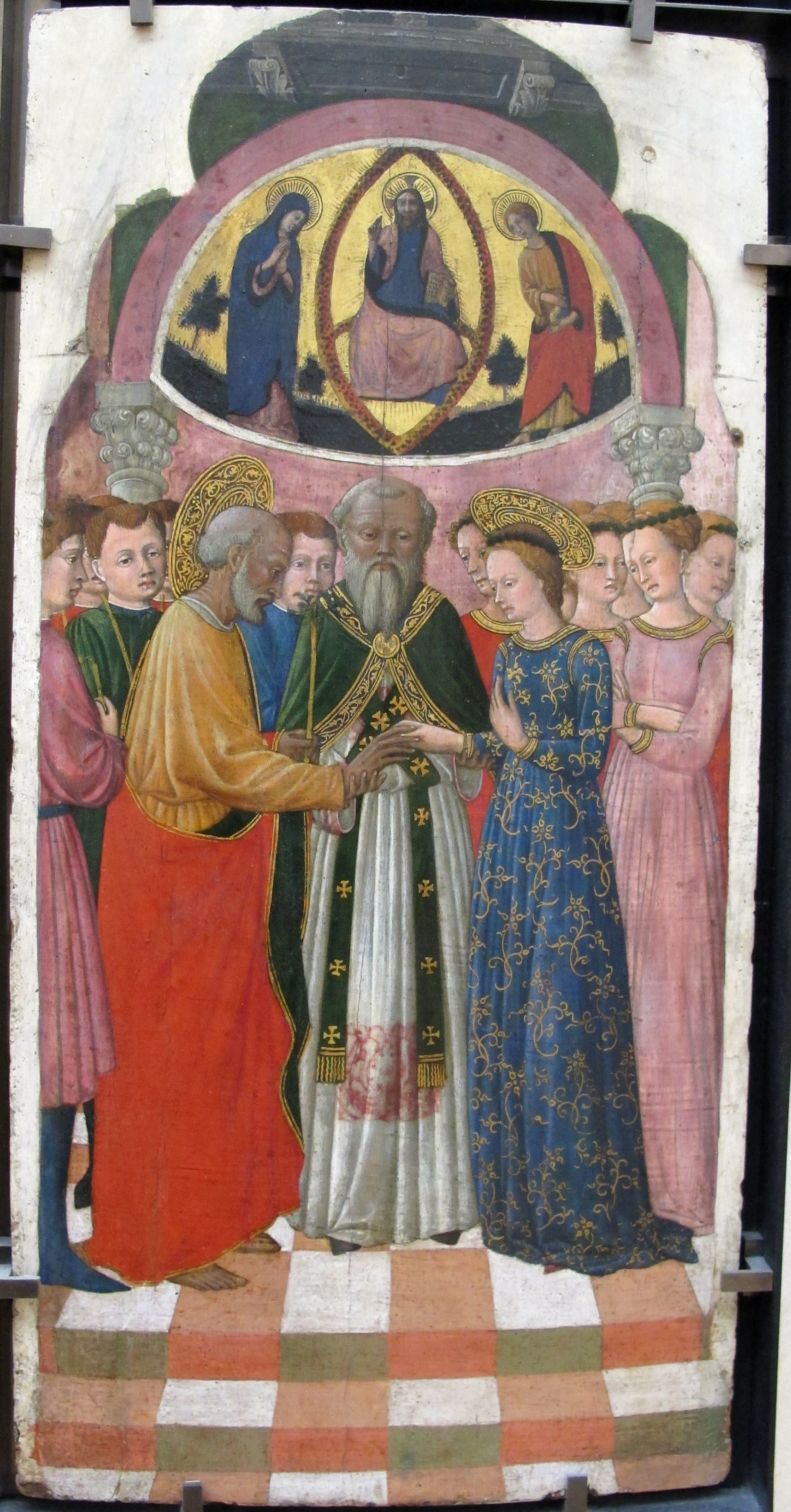 Pittura italiana del Quattrocento al Louvre, Parigi